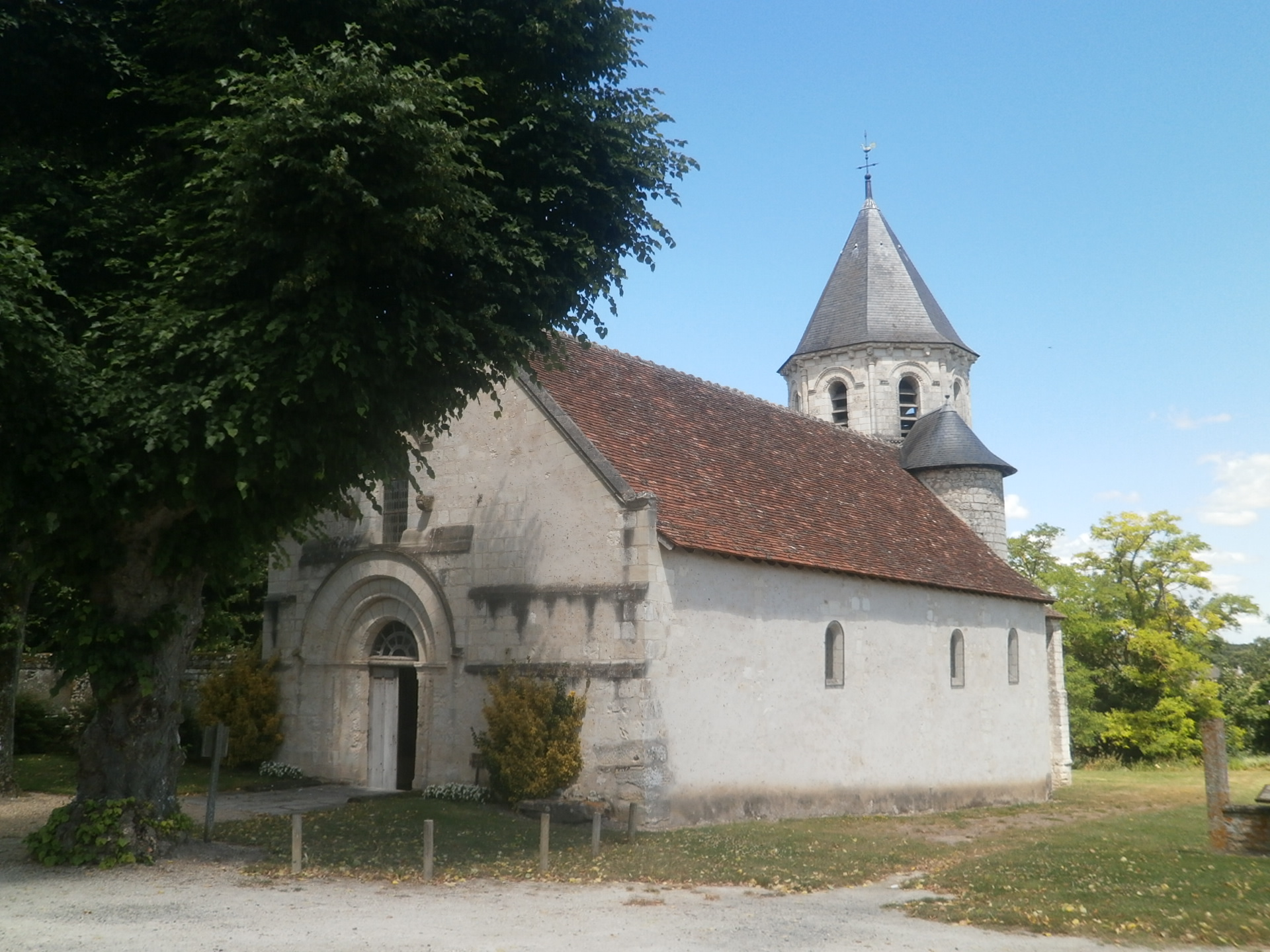 L'église d'Antogny-le-Tillac